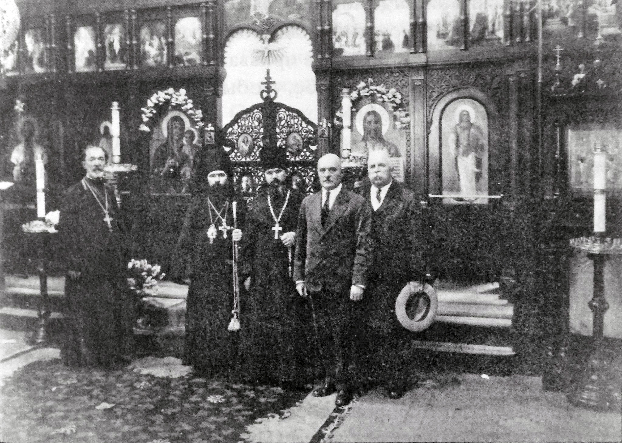 Протоиерей Александр, епископ Иоанн (Максимович), игумен из Харбина и генерал Фаддей Глебов. Свято-Николаевский храм. Шанхай. 1940-е годы.